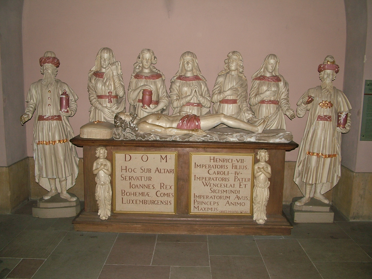 Grab Johann von Luxemburg